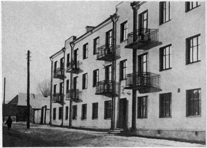 Мінск. Кааператыўны жылы дом швейнай фабрыкі «Кастрычнік». 1927. Раней вуліца Розы Люксембург, цяпер перабудаваны будынак па вул. Мяснікова, 40